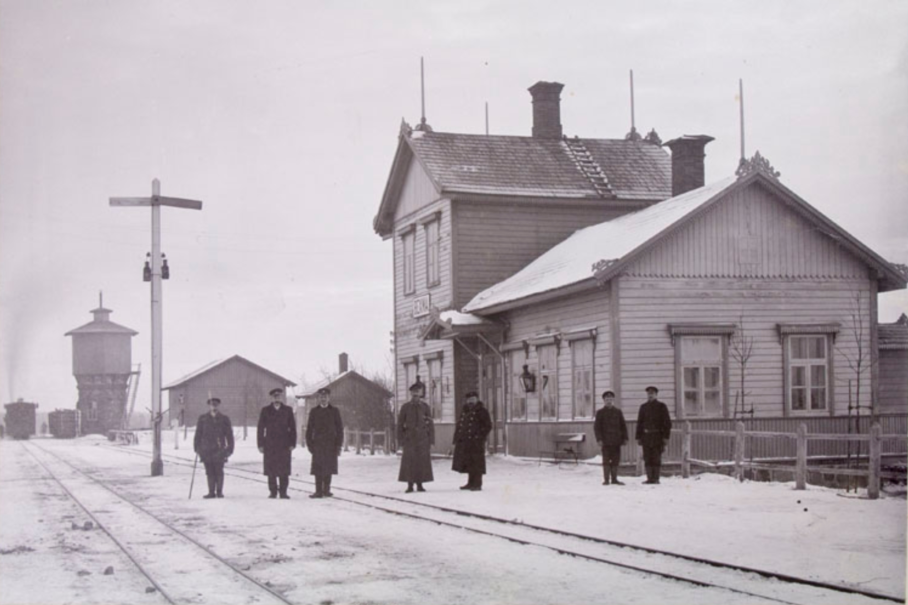 Võhma jaamaesine 20. sajandi alguses. Jaamahoone küljes oleval plagul seisab kirillitsas "ВЕХМА" (Võhma venekeelne nimetus).